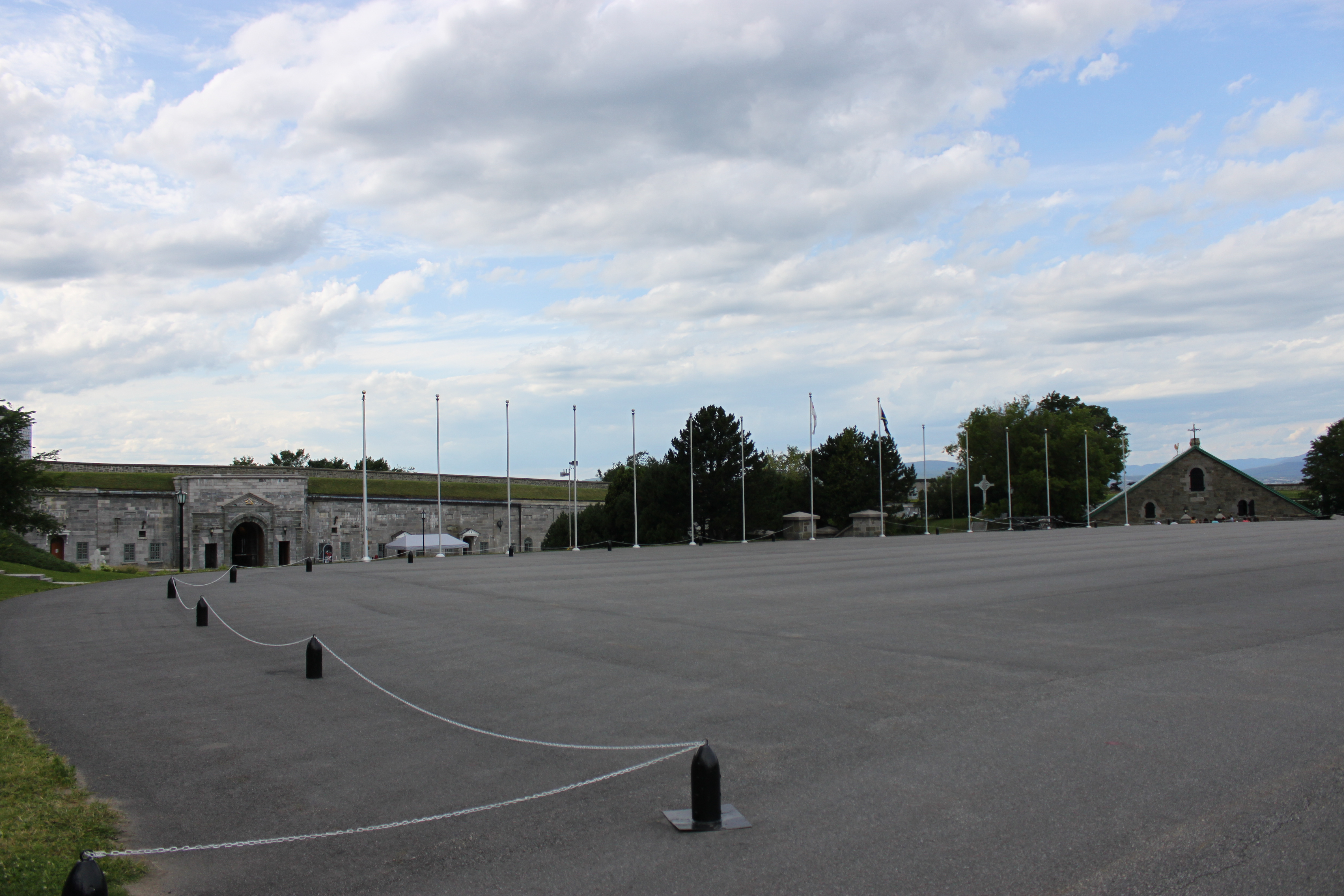 Innenhoch der Citadelle of Quebec